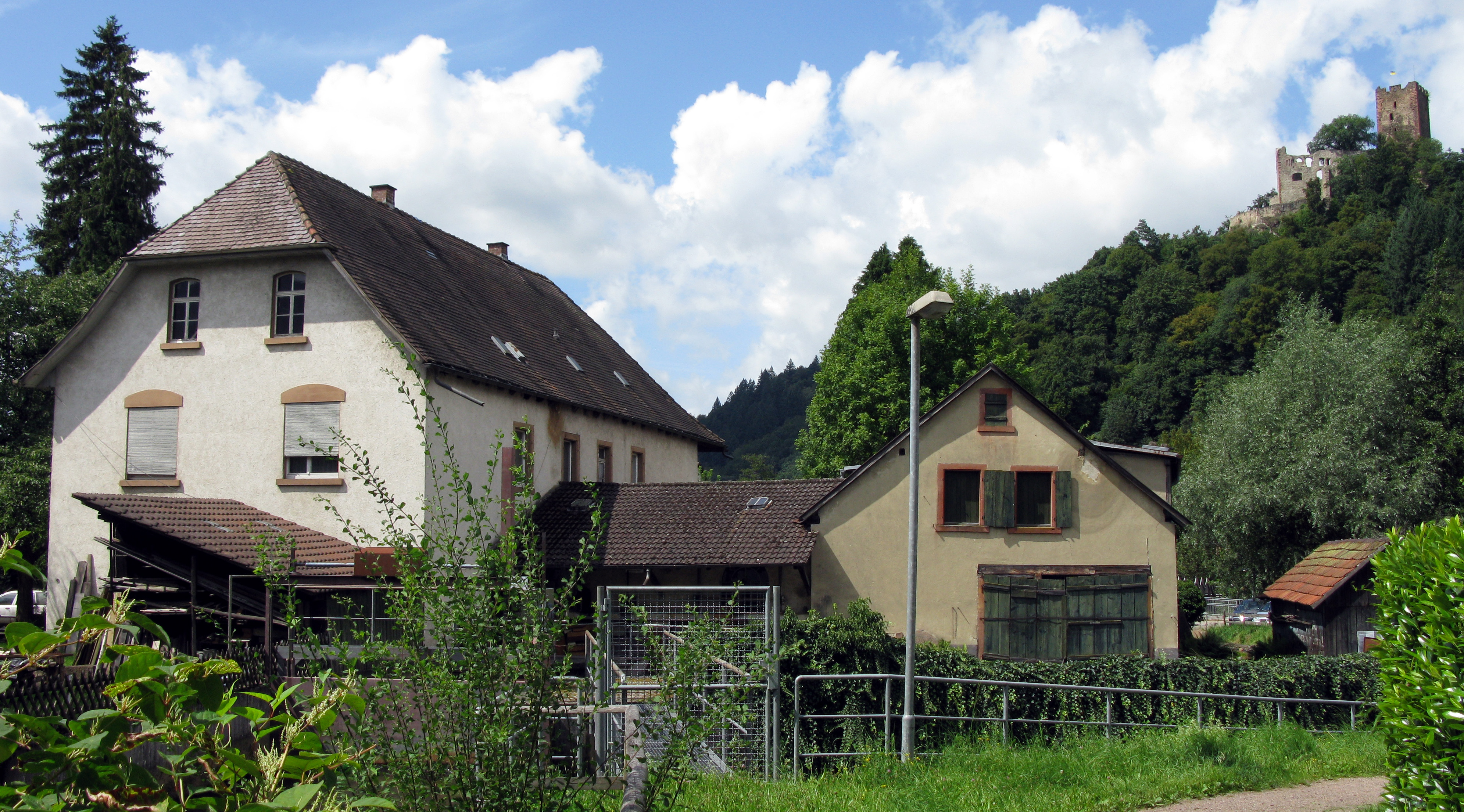 Edelsteinschleiferei Wintermantel in Waldkirch, im Hintergrund die Kastelburg